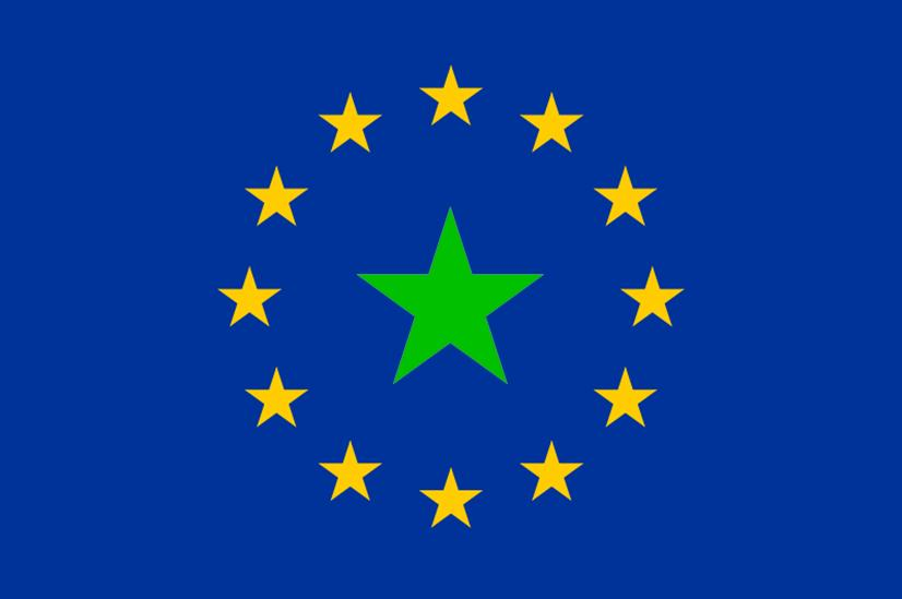 Propono por esperanta flago por la eŭropa unio Kategorio:Eŭropa Esperanto-Unio